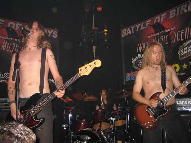 Reverend Bizarre actuando en 2005.